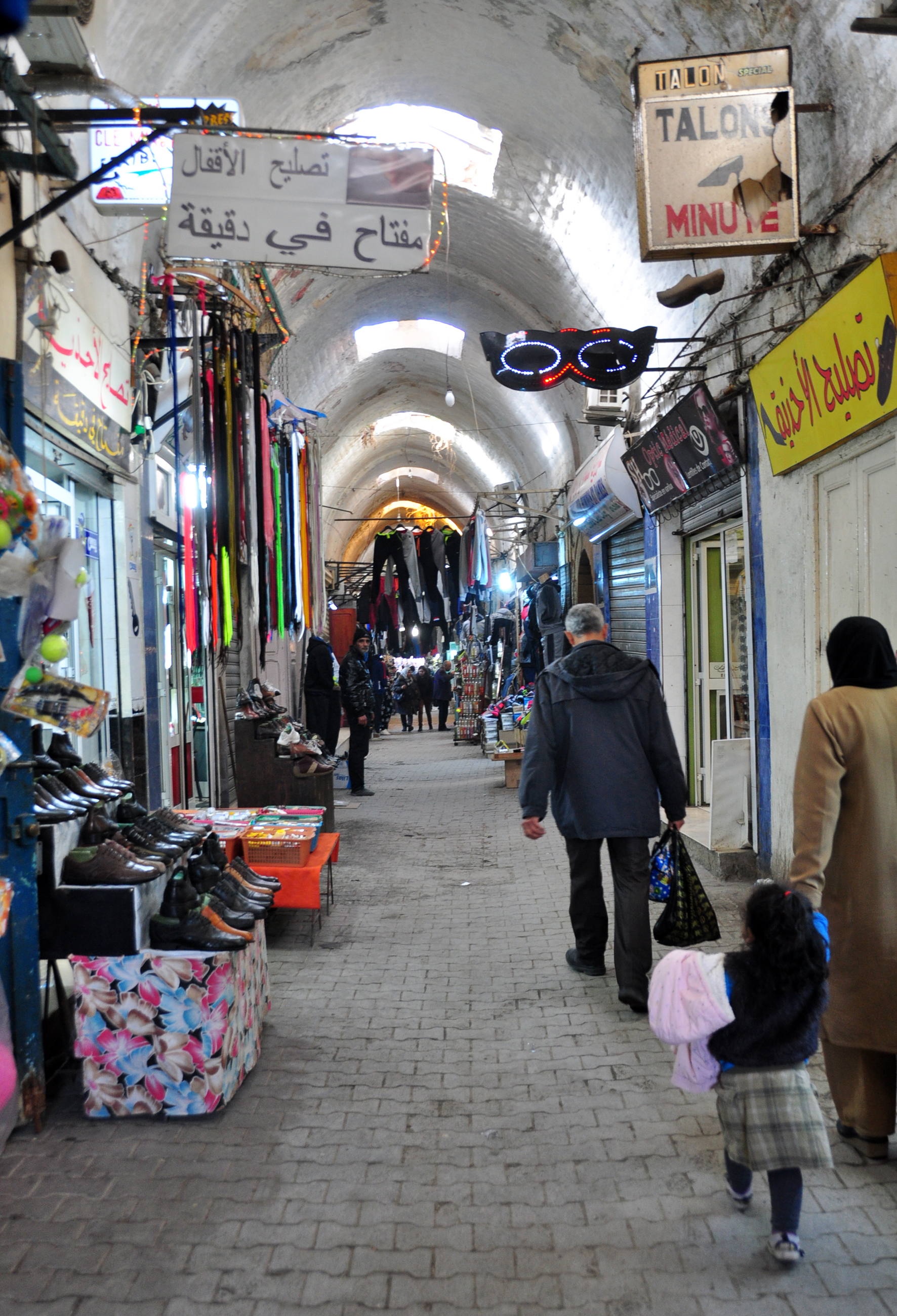 Souk El-Djedid